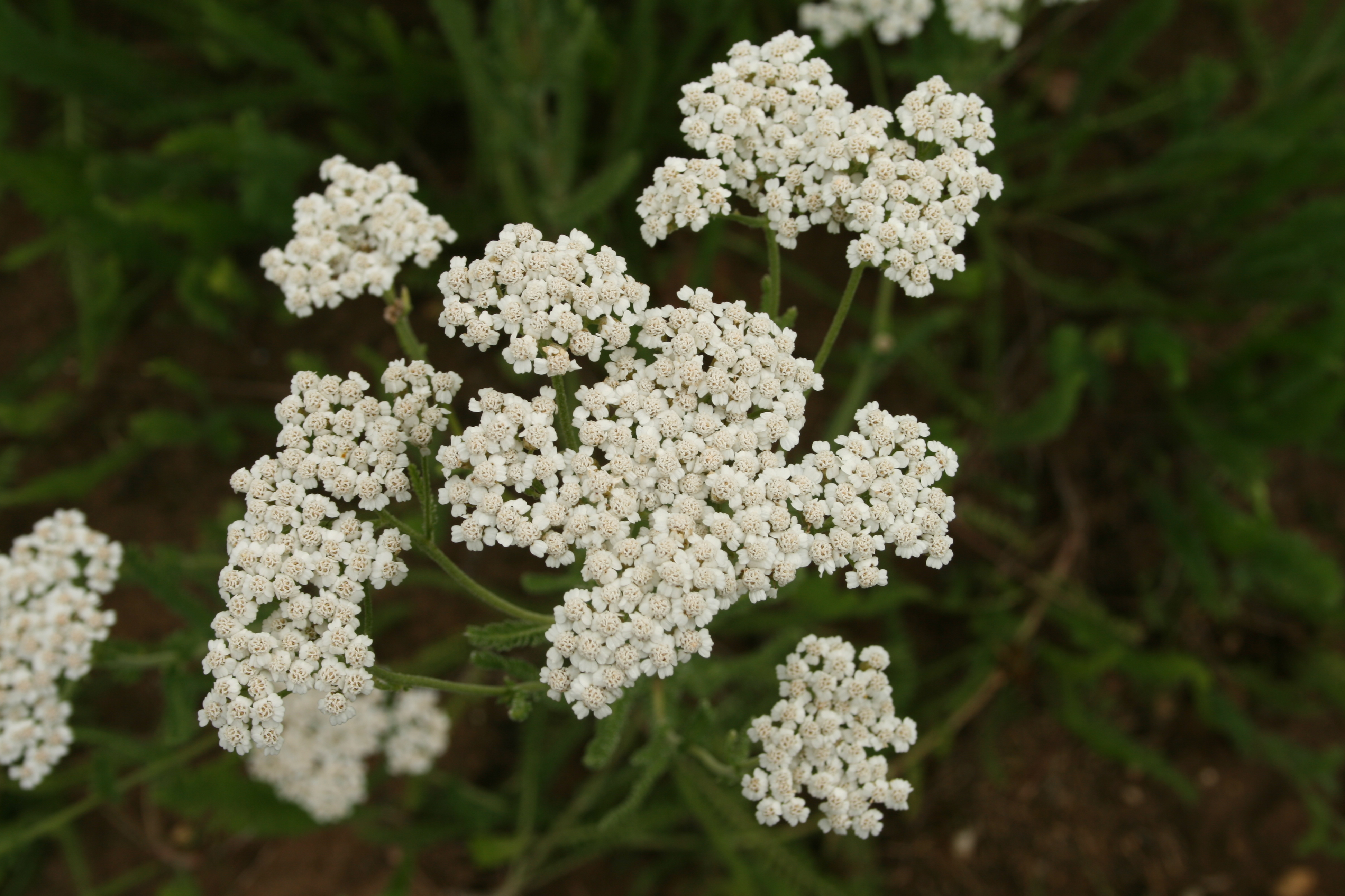 Asteraceae im Ober-Olmer Wald. Natalie Schmalz